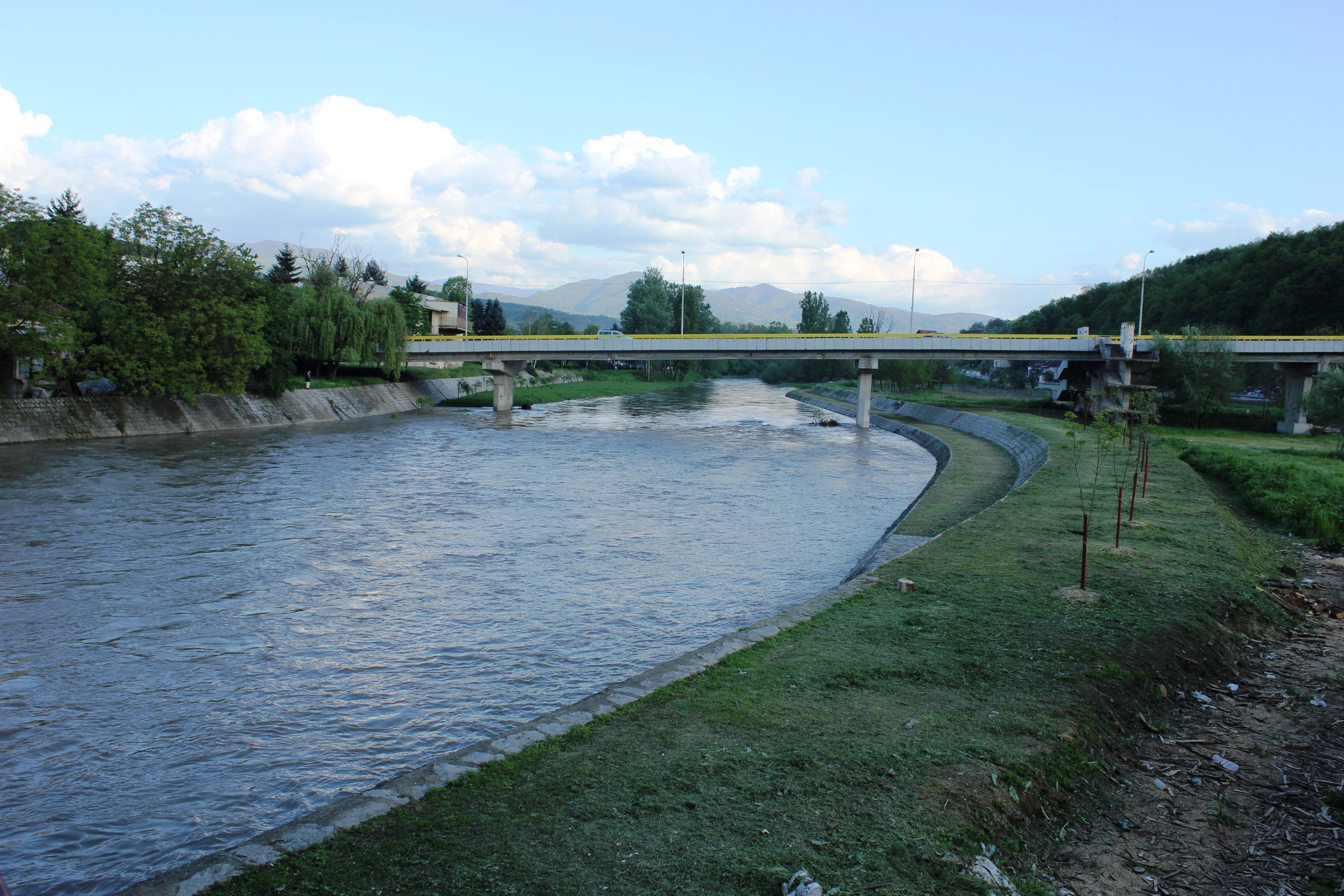 Река Южна Морава при град Владичин хан, Сърбия.